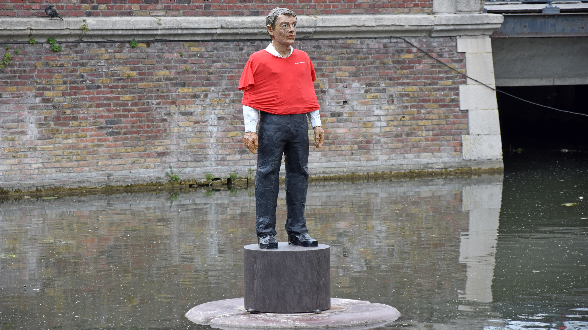 "L'Homme à la Bouée" est installé dans le canal de la Somme entre le quai Belu et la Rue Parmentier à Amiens